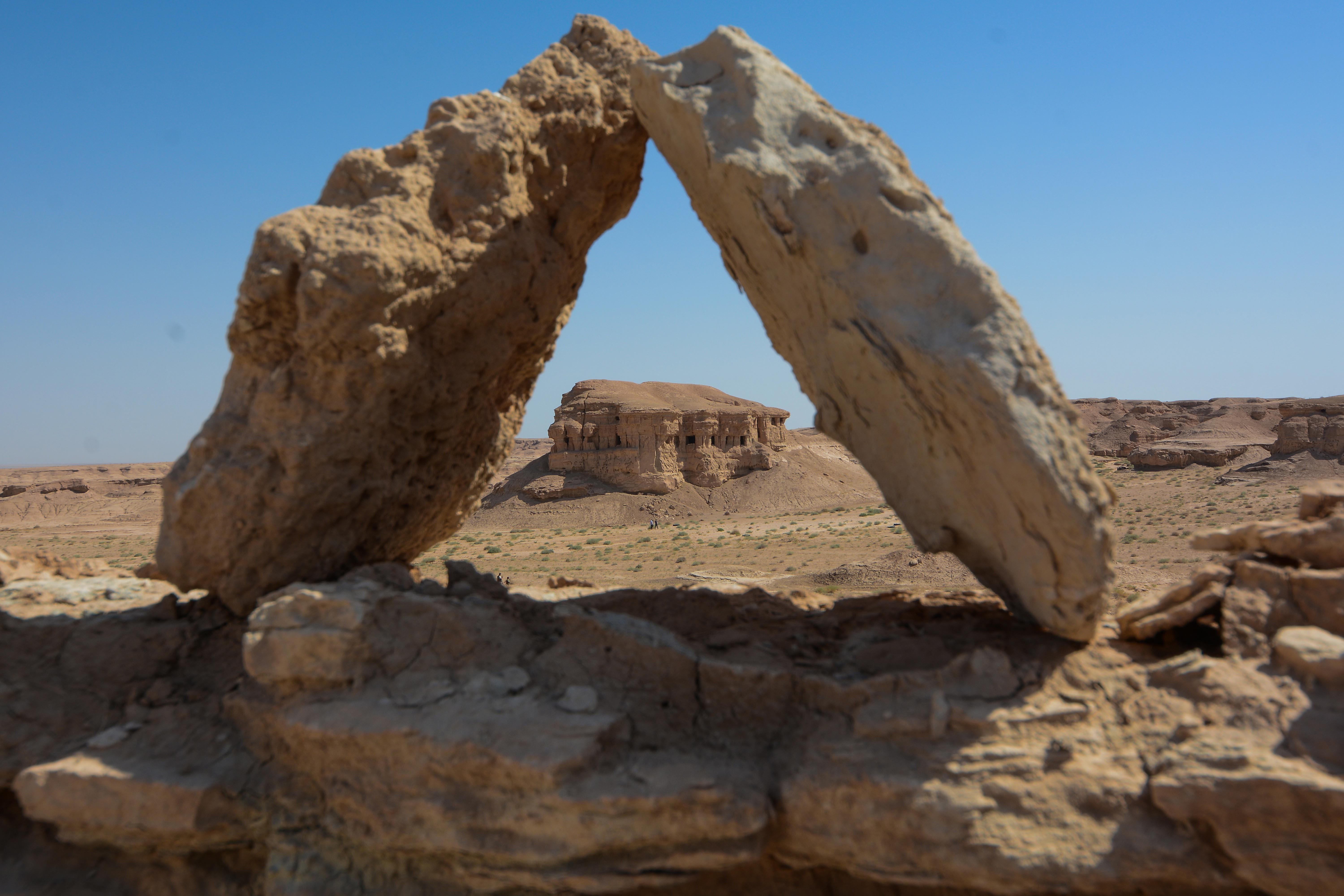 تقع كهوف الطار على يمين الطريق المؤدي إلى عين التمر ، حيث تبعد عن مركز محافظة كربلاء بمسافة تقدر بـ (45 كلم) جنوب غرب كربلاء. و(15) كم إلى الشمال الشرقي من حصن الاخيضر. كما أنها تقع غرب العاصمة القديمة بابل مسافة (80) كم. وهذا التكوين المركب من مجموعة الكهوف محاط بعدة وديان وواحات، ويحتل موقعاً مهماً في الجزيرة العراقية الجنوبية العربية؛ حيث تقع بين بابل من الشرق والجزيرة من الغرب. لذلك من المحتمل جداً ان تكون في العهود القديمة محطة مرور للأقوام القديمة الذين ينتقلون في الغرب أو الجنوب إلى جهة الشرق. كذلك من الشرق إلى المناطق الغربية والجنوبية